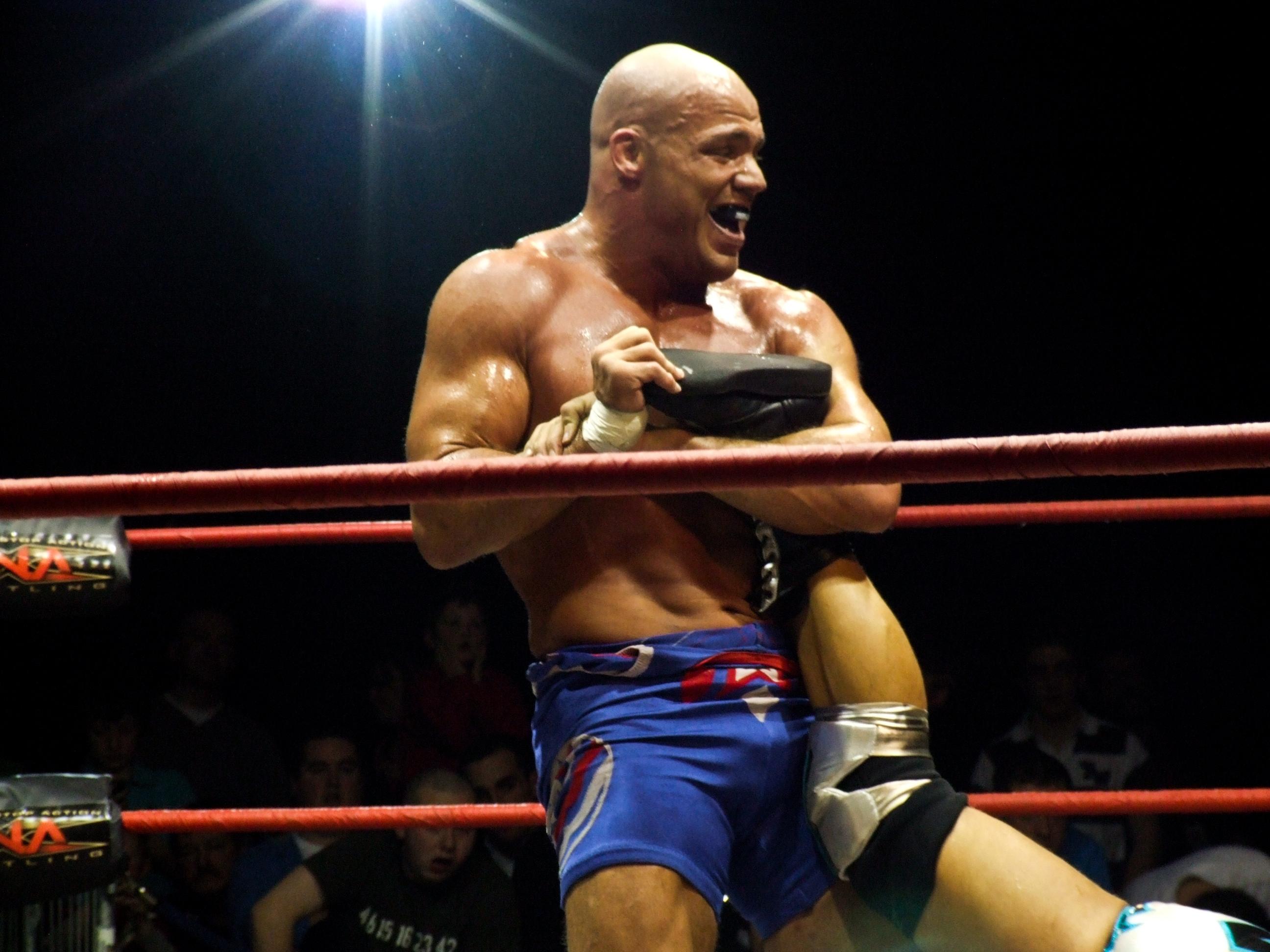 Cette photo a été prise le 17 janvier 2009. TNA / National Stadium / Dublin / 17-1-09